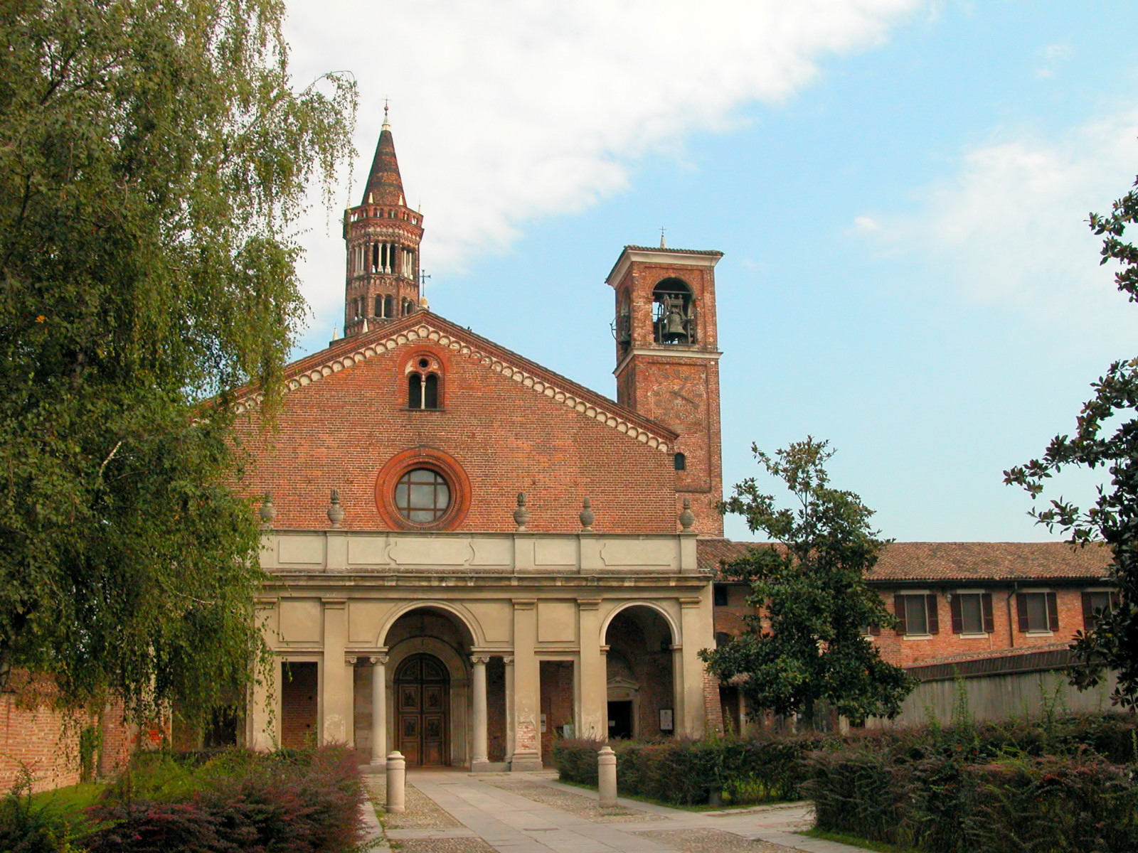 La facciata dell'Abbazia di Chiaravalle a Milano. Foto da me realizzata.